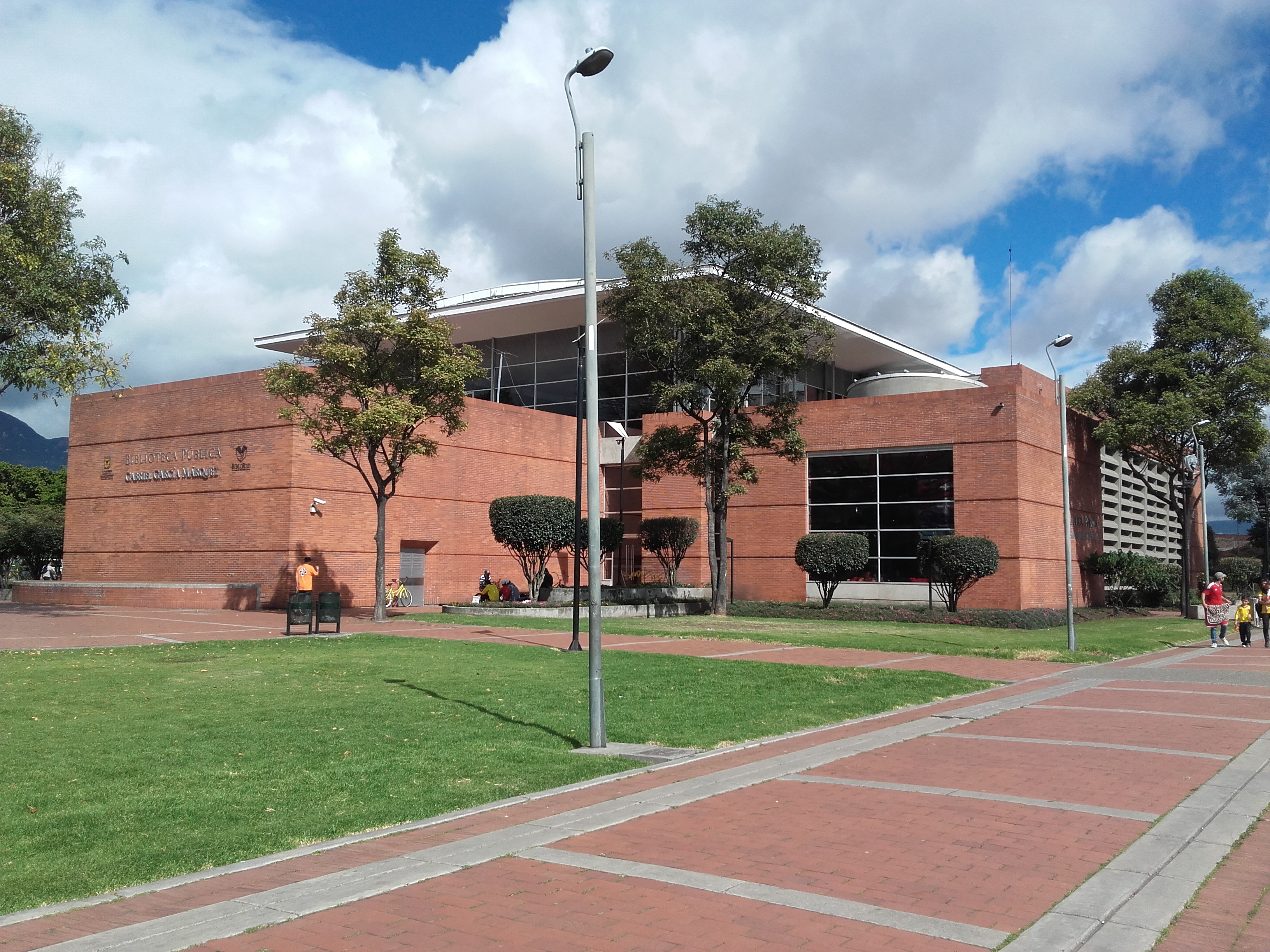 parquesss